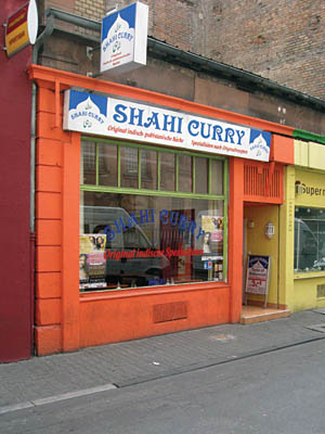 Stolpersteinlage Holzgraben 11 für Commons.wikimedia freigegeben von der Initiative Stolpersteine Frankfurt am Main